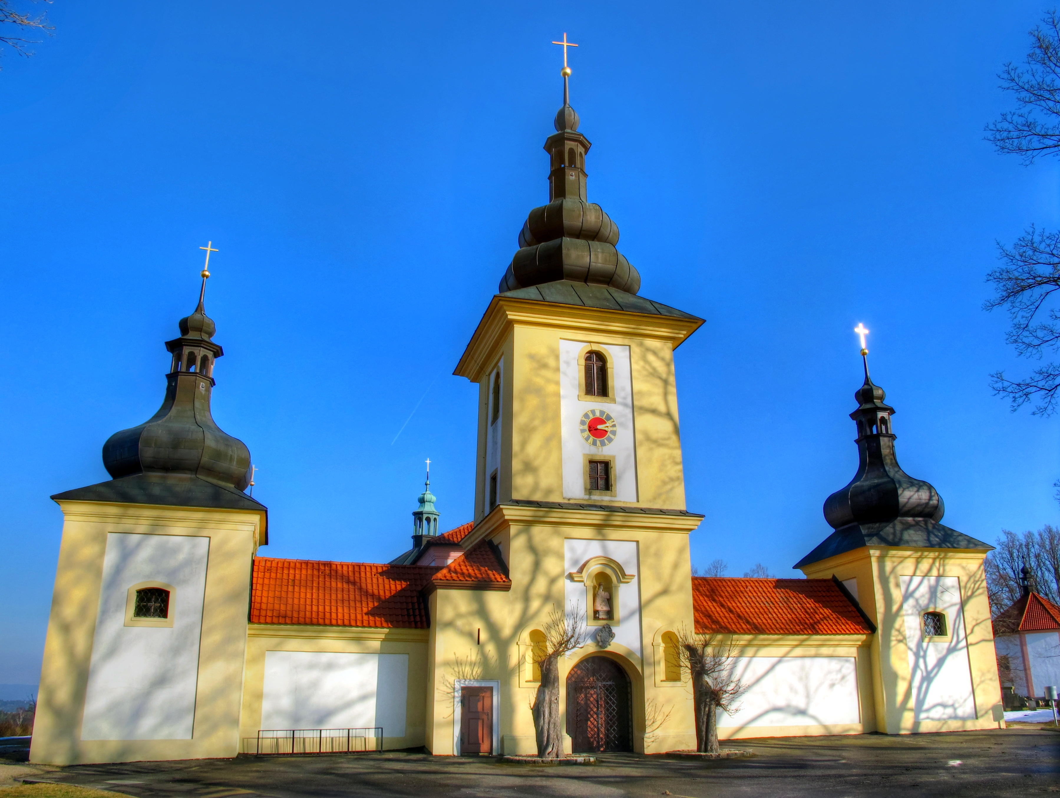 Ehem. Wallfahrtskirche Maria Loreto in Starý Hrozňatov (Altkinsberg) bei Eger